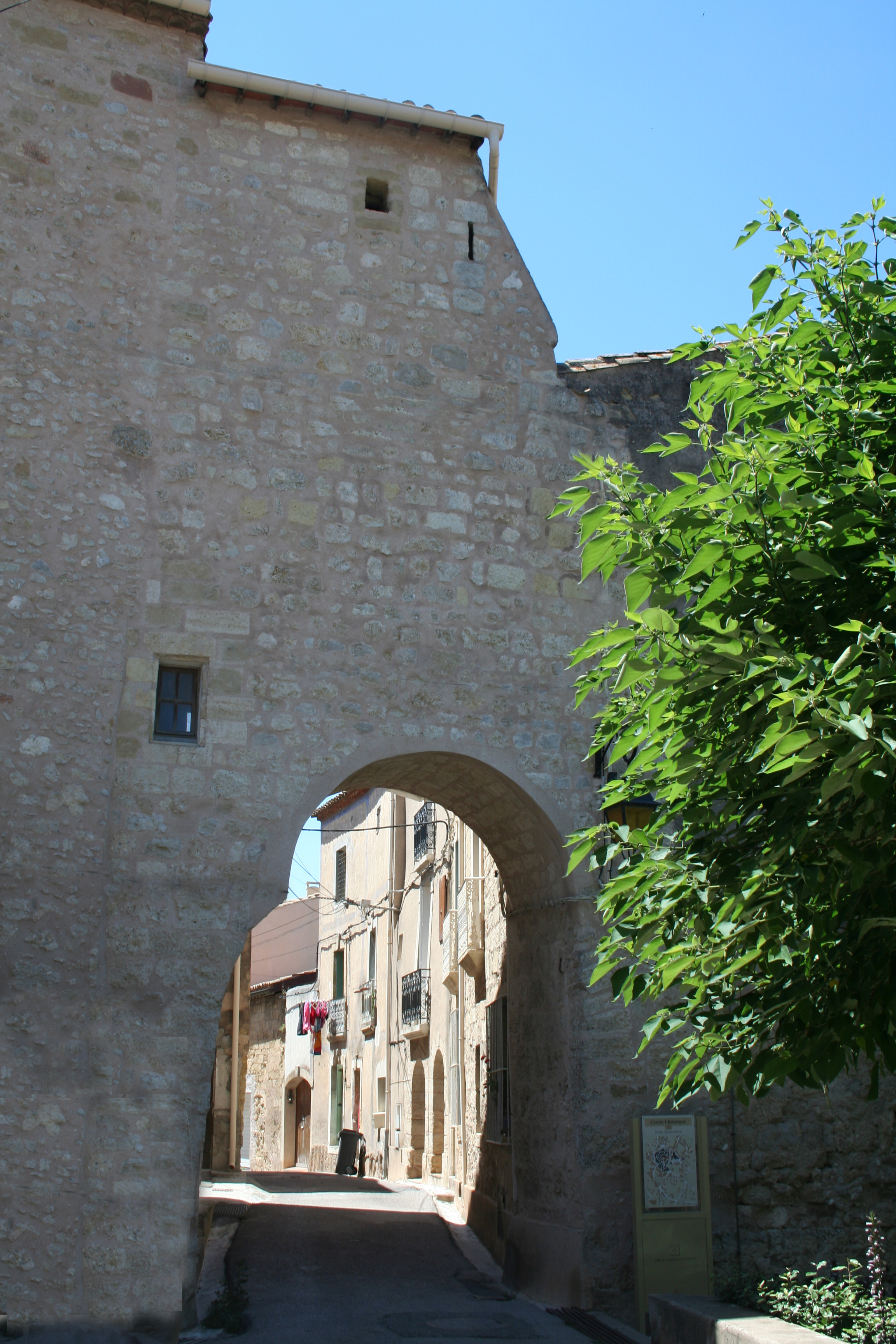 Castelnau-de-Guers (Hérault)- côté externe de la porte Sainte-Anne (au nord du village).